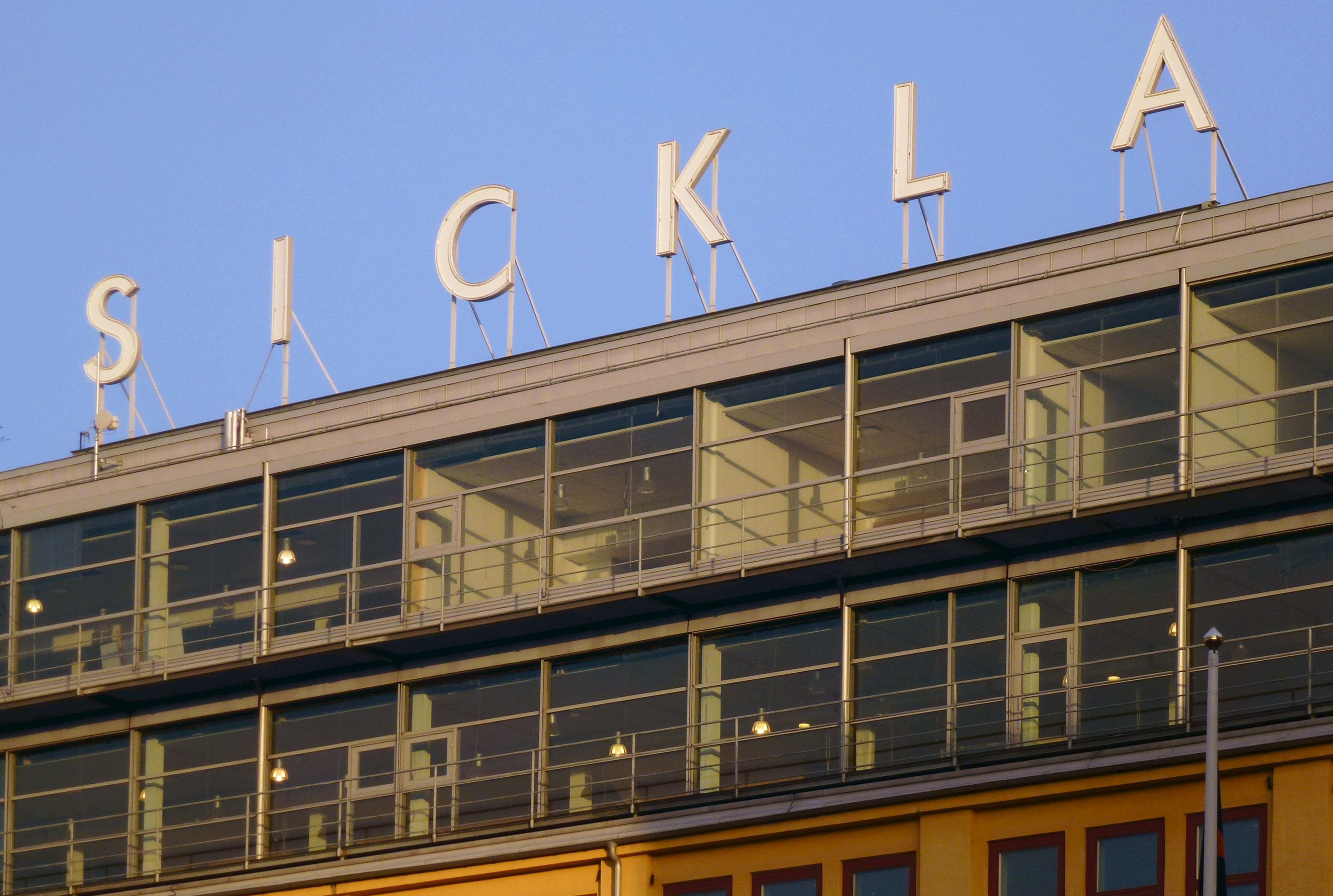 Sickla Köpkvarter text